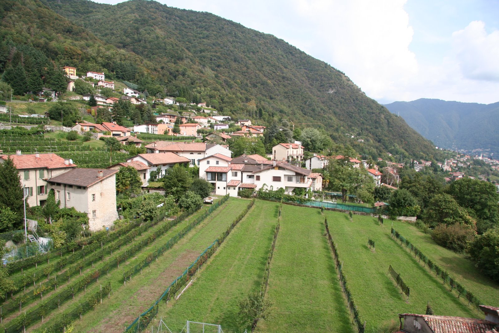 Vista del paese vecchio di Vacallo dal campanile